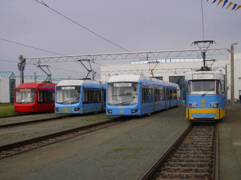 Bahnbetriebshof der CVAG in Chemnitz-Adelsberg mit Ausstellung aller derzeit in Chemnitz eingesetzten Straßenbahnen. Von links nach rechts: Regio-Variobahn 6NGT-LDZ, Zweirichtungs-Variobahn 6NGT-LDZ, Einrichter 6NGT-LDE, modernisierter Tatra-Großzug bestehend aus T3D-MS / T3D-MG und Beiwagen B3D-M